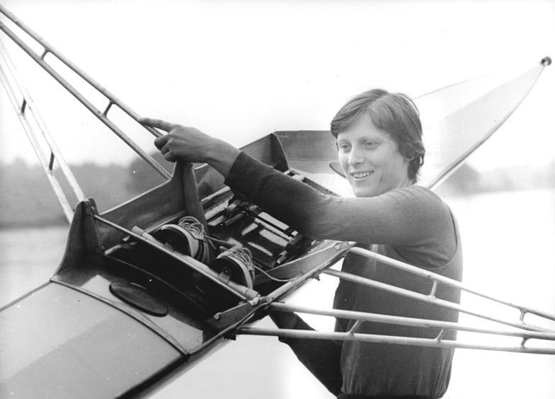 Christine Scheiblich Zum Beitrag: Elberudern macht hart - Aus dem Trainingsalltag der Skuller-Weltmeisterin Christine Scheiblich ADN-ZB Häßler-11.8.1977-ha. Die zweifache Weltmeisterin, Olympiasiegerin und frisch gebackene DDR-Meisterin im Einer der Frauen ist nach ihrer überstandenen Verletzungspause wieder voll da! Hier schickt sie sich an, ihr schnittiges Boot zu Wasser zu lassen, um das Training auf der Elbe zu beginnen. Die Skullerin vom SC Einheit Dresden wird von ihrem berühmten Trainer Dieter Schubert, der im legendären Vierer ohne Steuermann des selben Klubs saß, als sehr trainingsfleißig eingeschätzt. (Beachten Sie hierzu bitte auch S 0811-301 und 302 N)